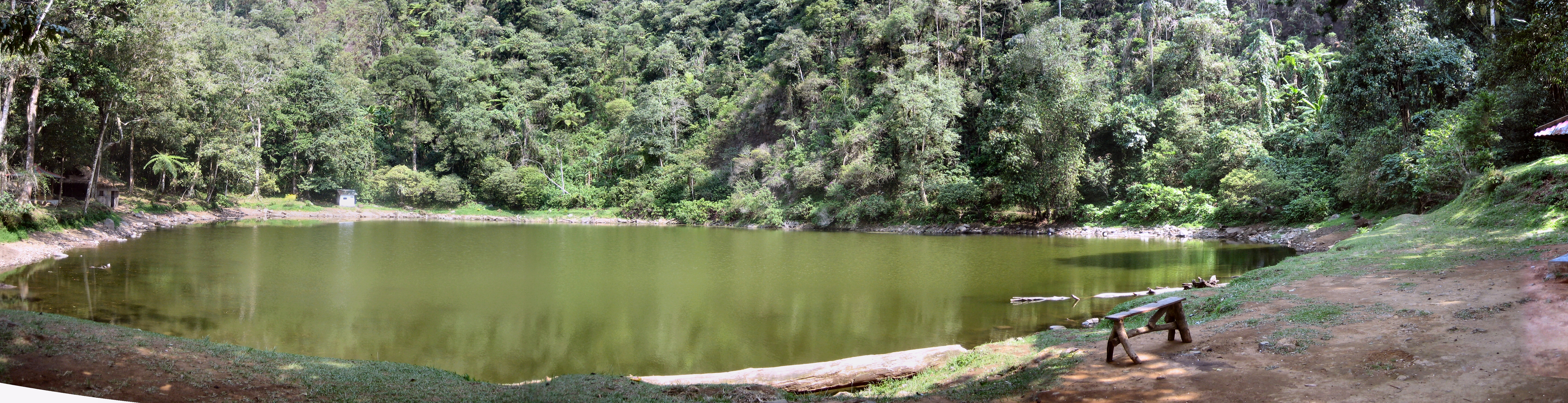 Telaga Warna Lake Puncak Pass Java - Indonesia Picture taken november 2006 by Hullie